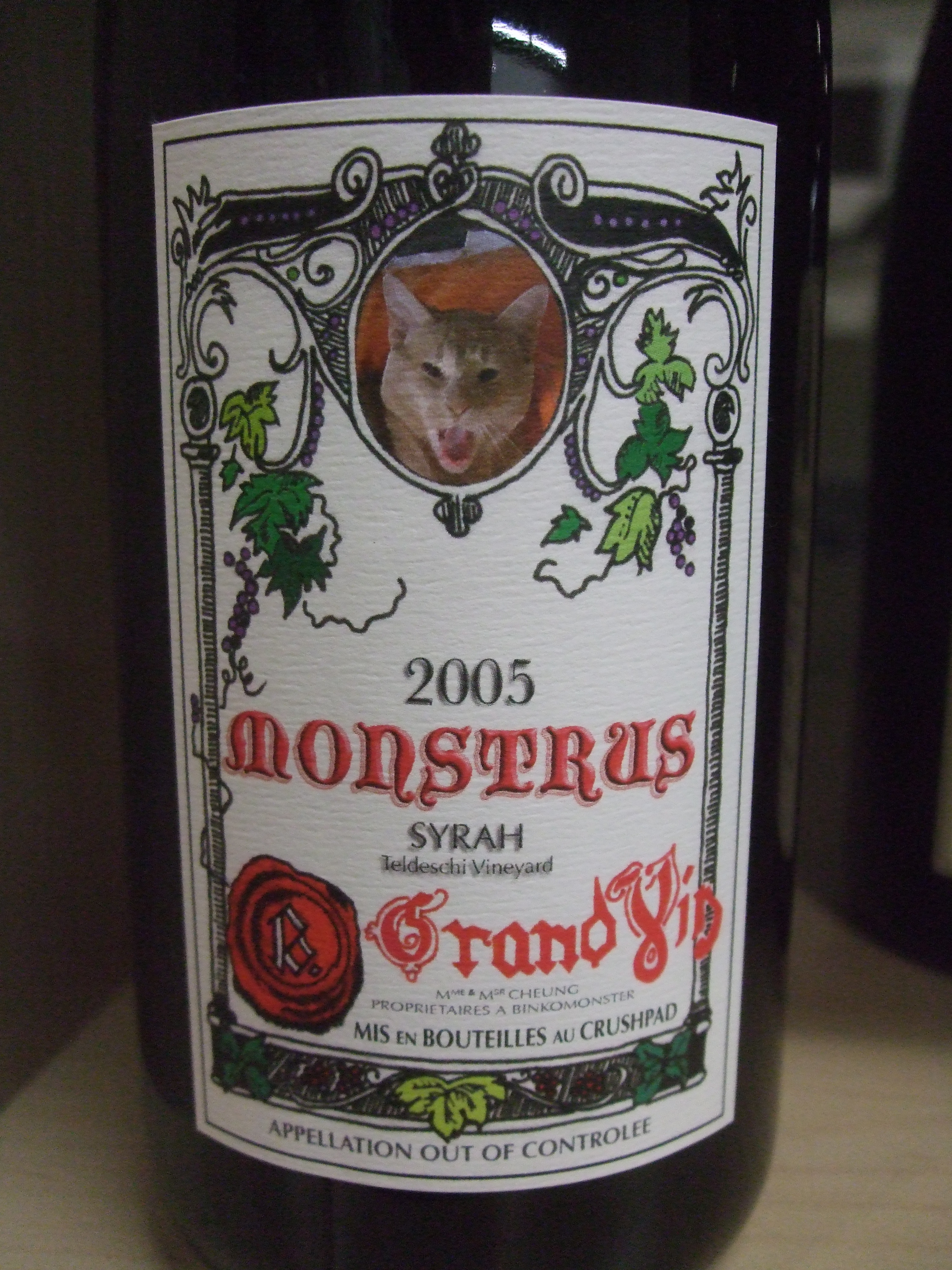 Syrah mise en bouteille chez Crushpad